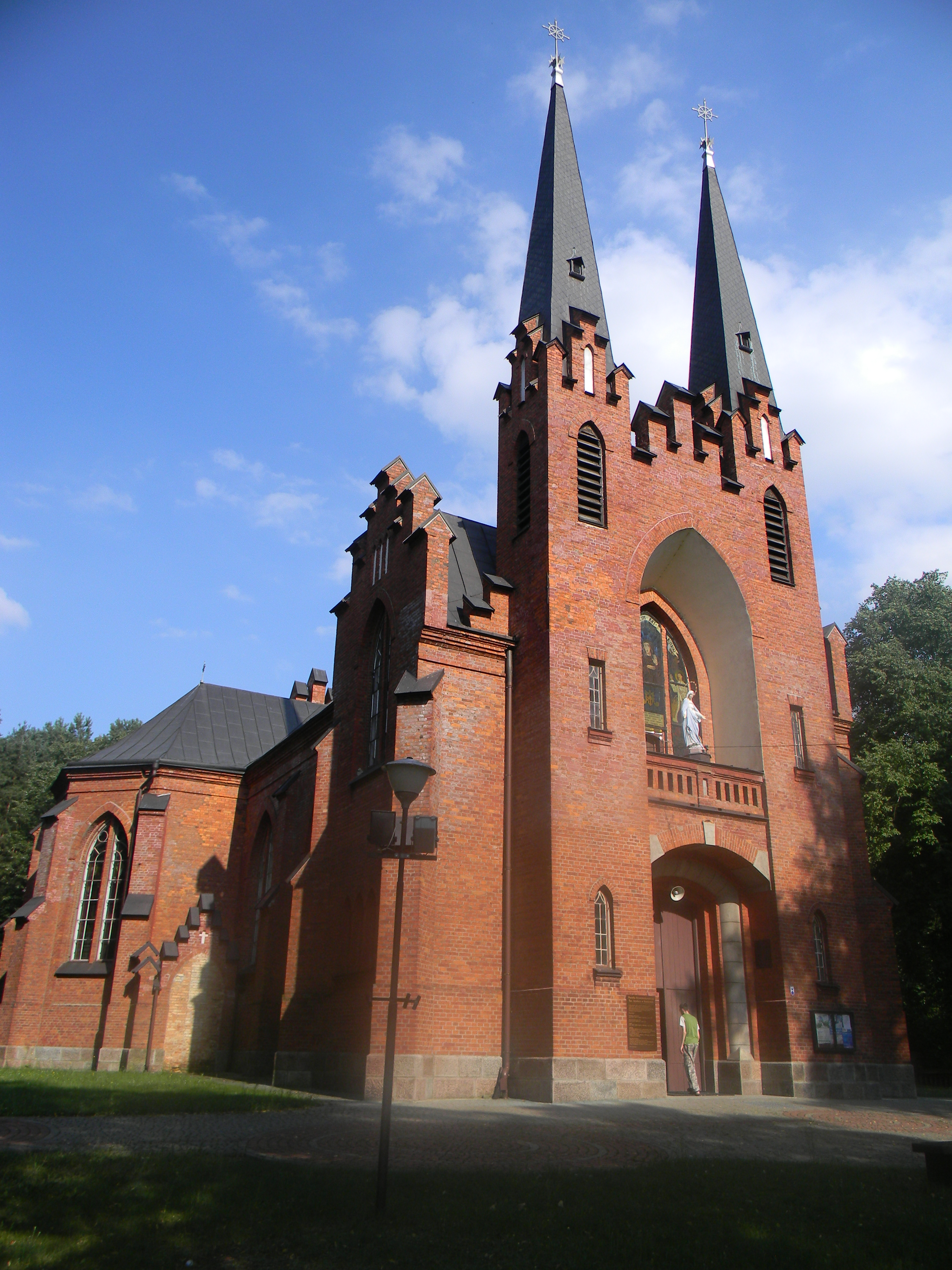 Rusków - kościół parafialny p.w. św. Izydora, 1905-1908, ogrodzenie i cmentarz przykościelny (zabytek nr A-216)